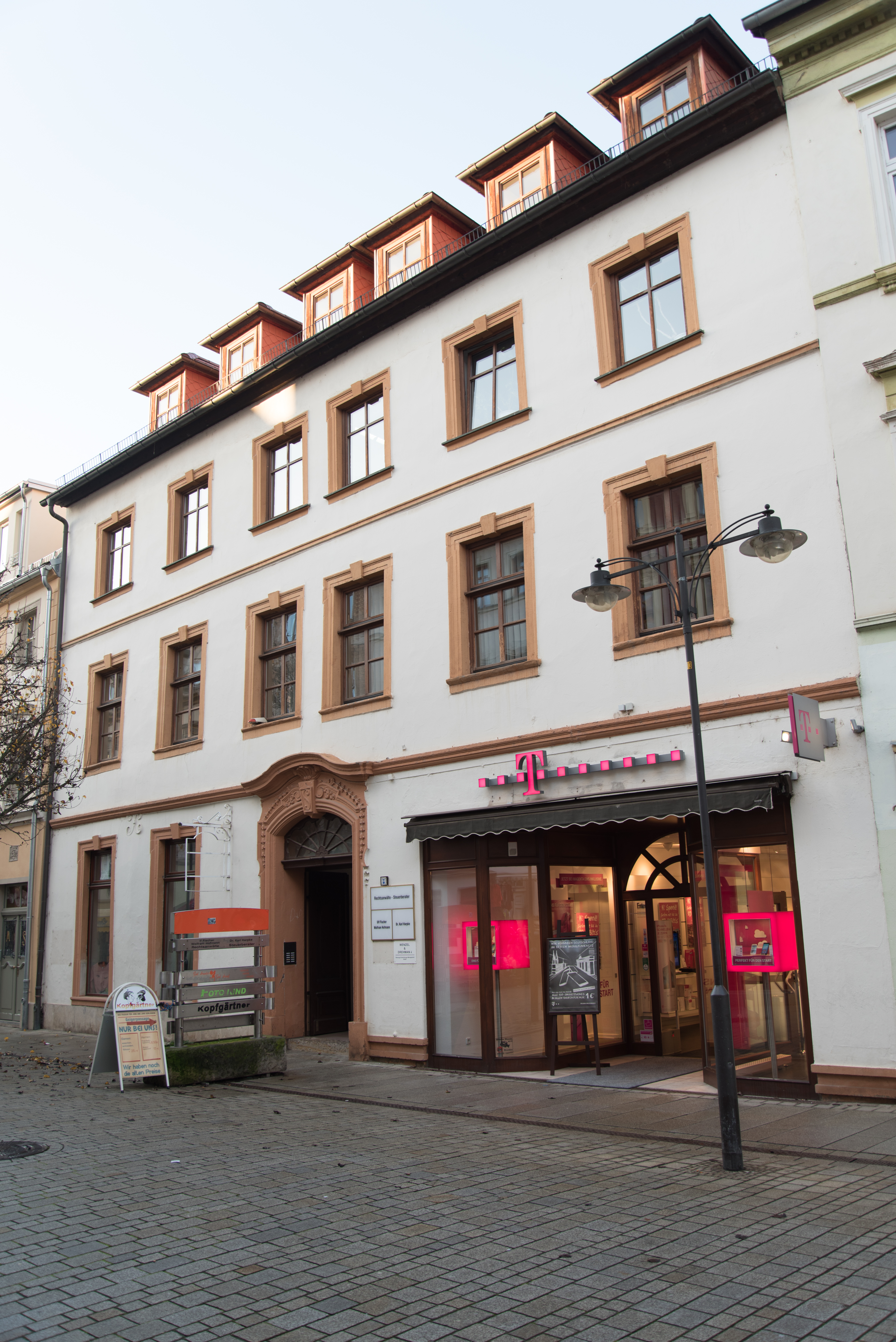 Weißenfels, Jüdenstraße 31